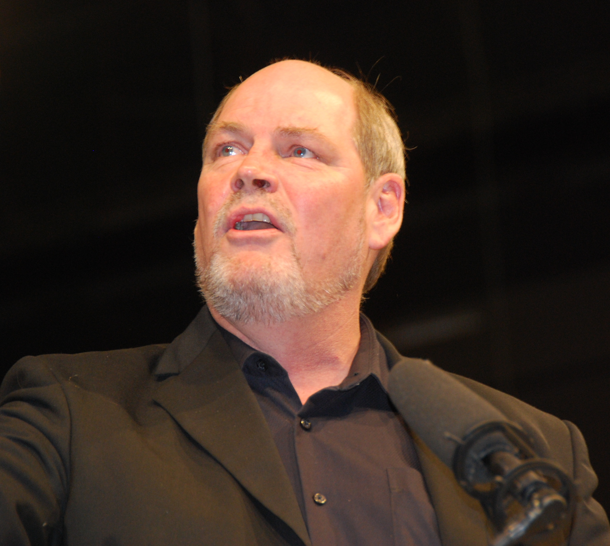 Carsten Hansen, medlem af Folketinget for Socialdemokraterne.